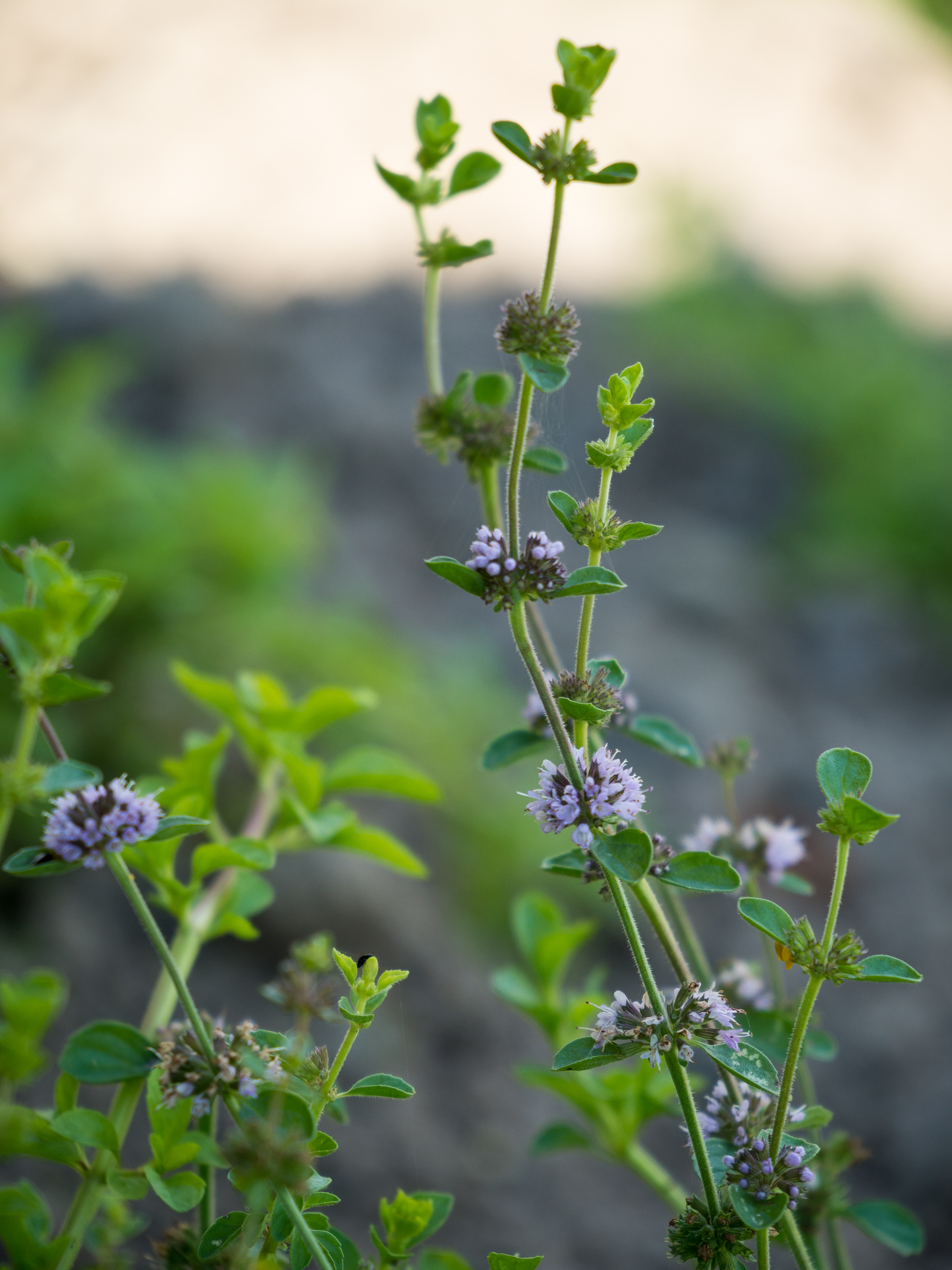 Die Polei-Minze (Mentha pulegium), Polei oder Flohkraut